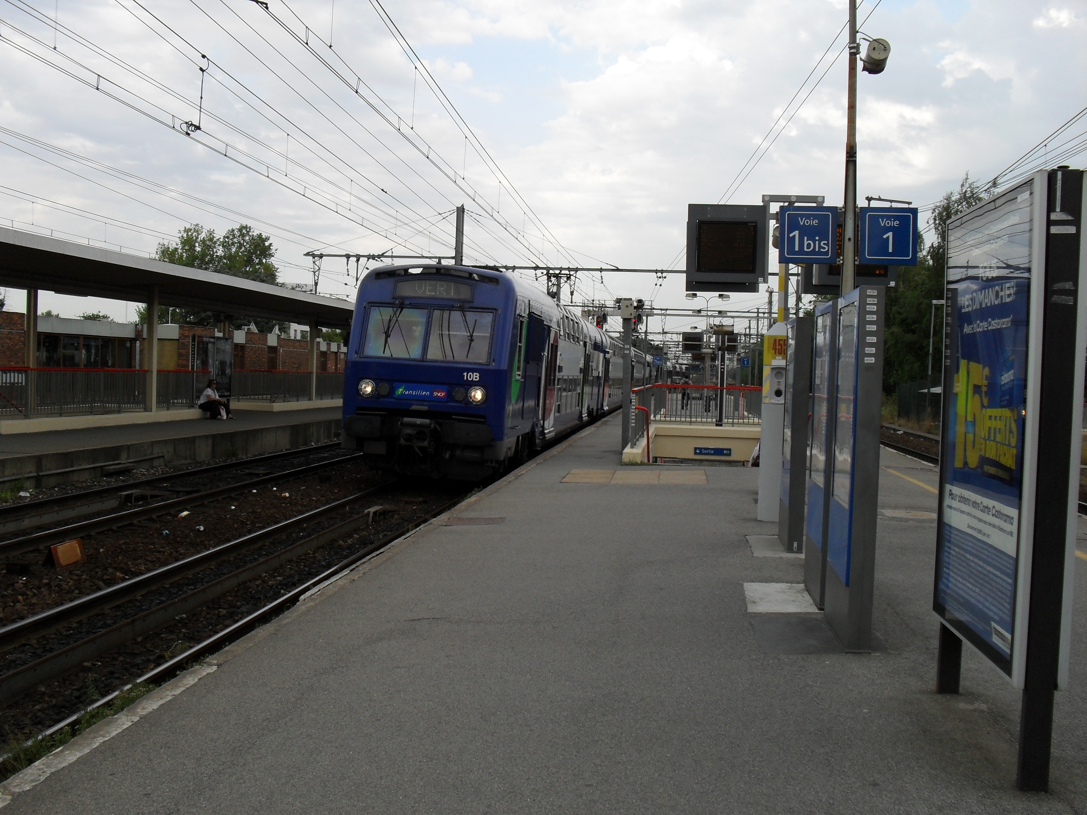 Gare de La Verrière